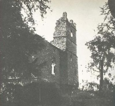 ארמון החתונות